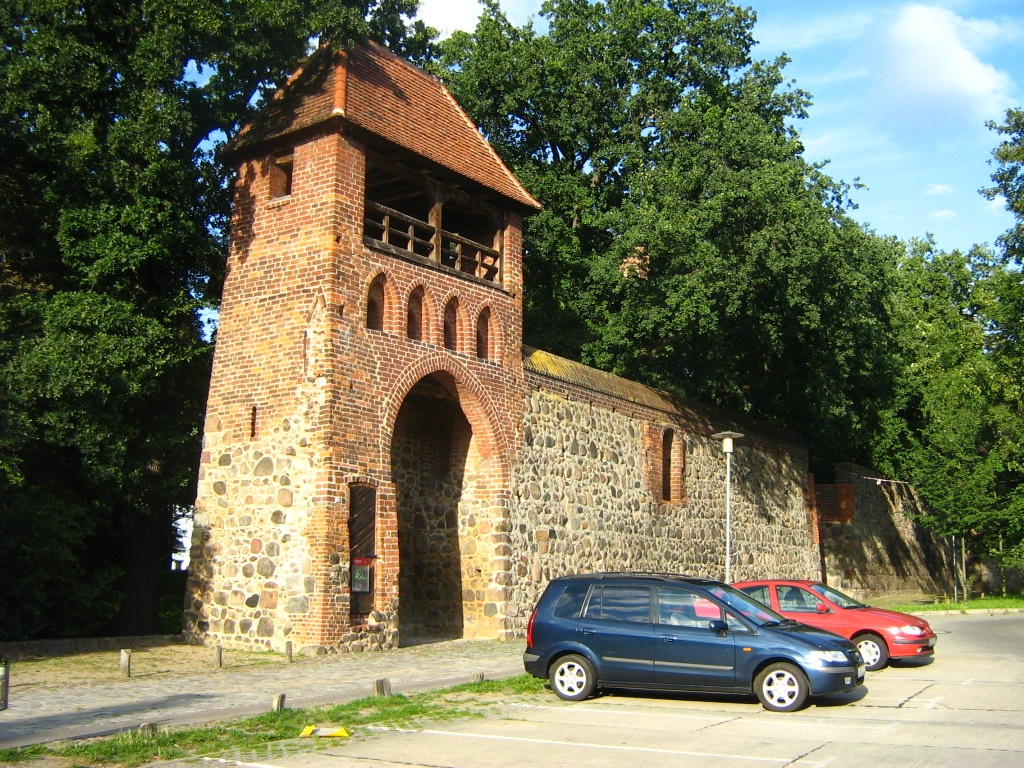 Rekonstruktion (19.Jh.)eines Wiekhauses in der Neubrandenburger Stadtmauer.